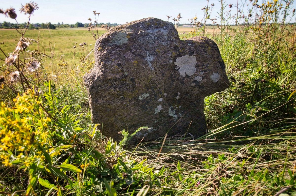 Кішы. Каменныя крыжы